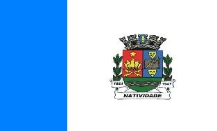 Bandeira do município de Natividade.